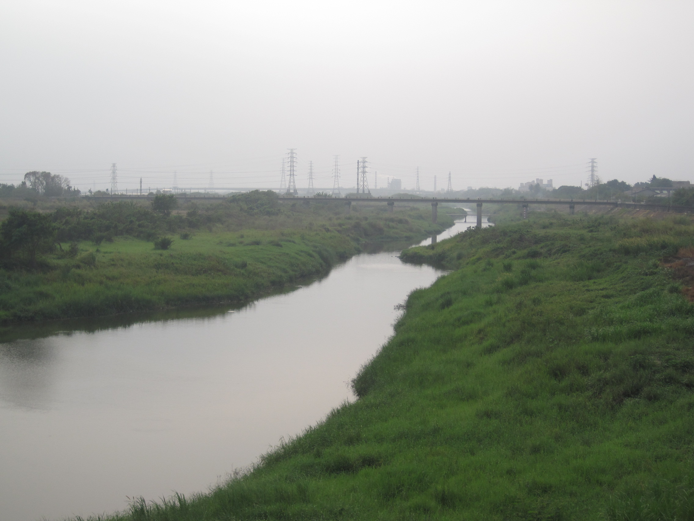 自鄉道南69線、南95線共線上的集水橋往西拍攝的風景，圖中之橋為臺糖鐵路橋